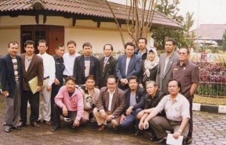 Pansus Hari Jadi Kota Depok